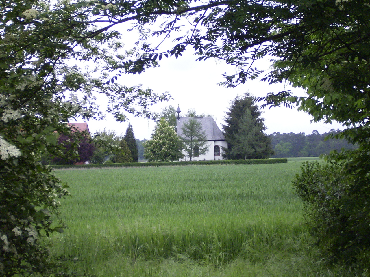 Rodgau-Weiskirchen Hessen Kapelle des Schönstatt-Zentrums